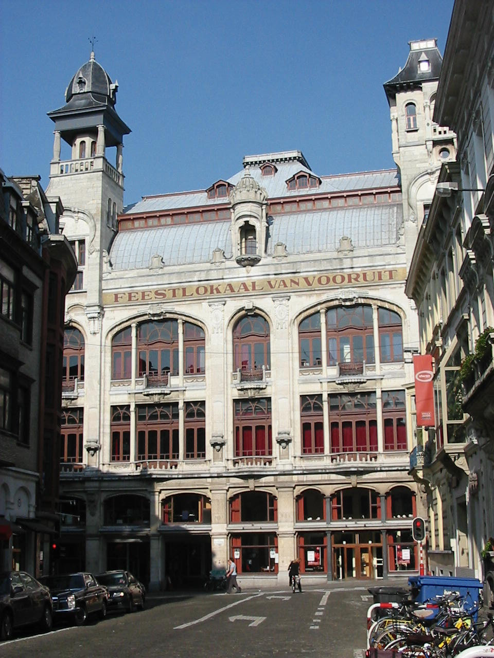 Gevel van de Vooruit in Gent gezien vanuit de Bagattenstraat.